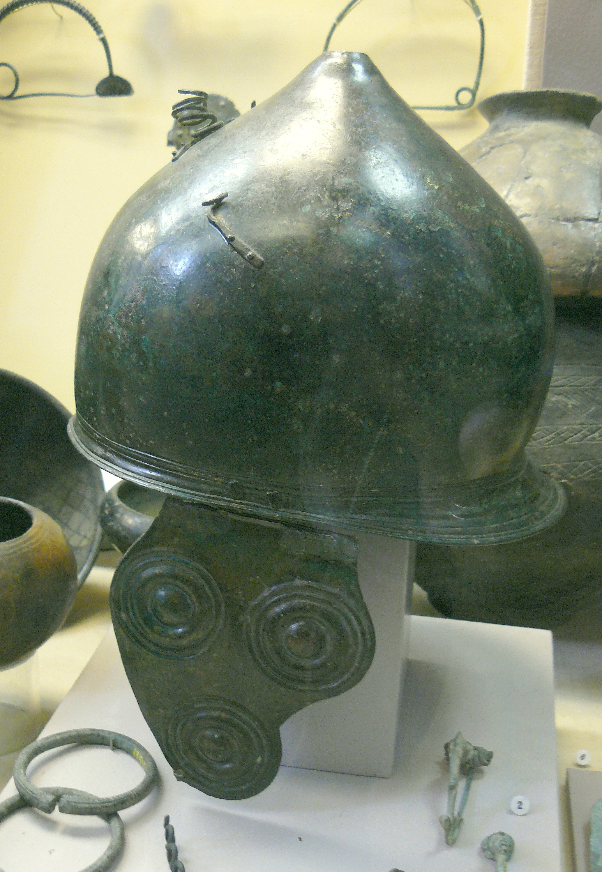 Casque de type gaulois - Italie du Nord - IIème/Ier siècle av. J.C. - bronze - M.A.N. St-Germain-en-Laye